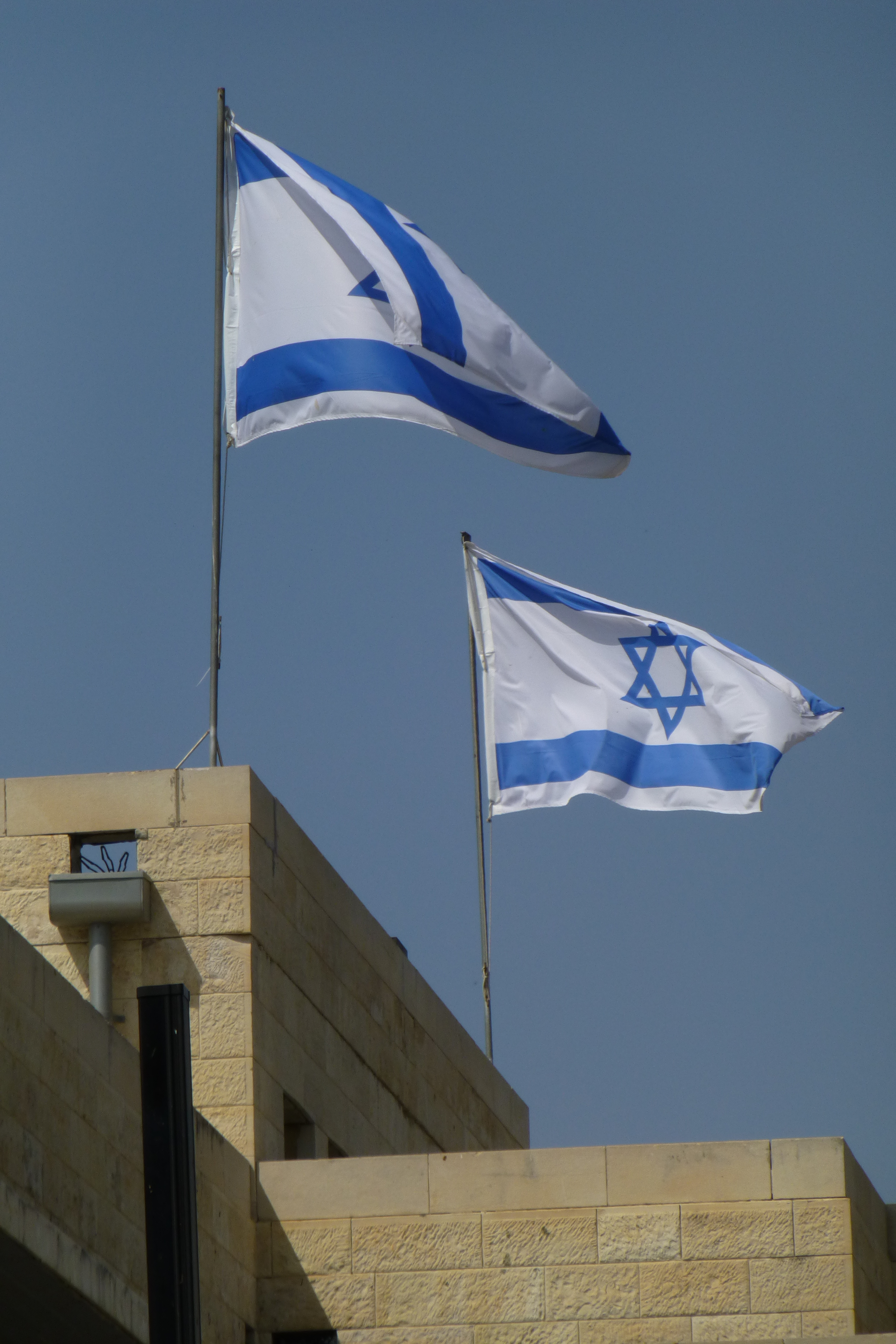 בית המשפט המנדטורי - בניין מבקר המדינה.